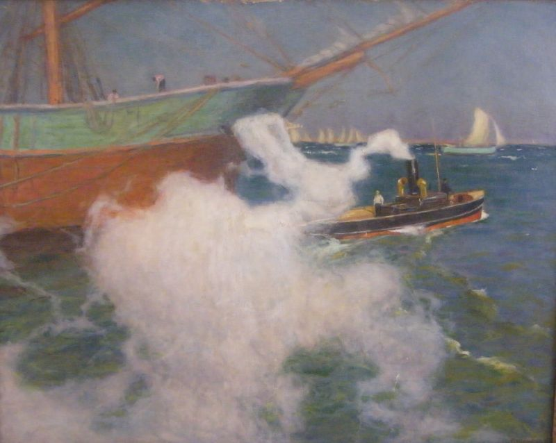 Головков Герасим Семенович В одесском порту